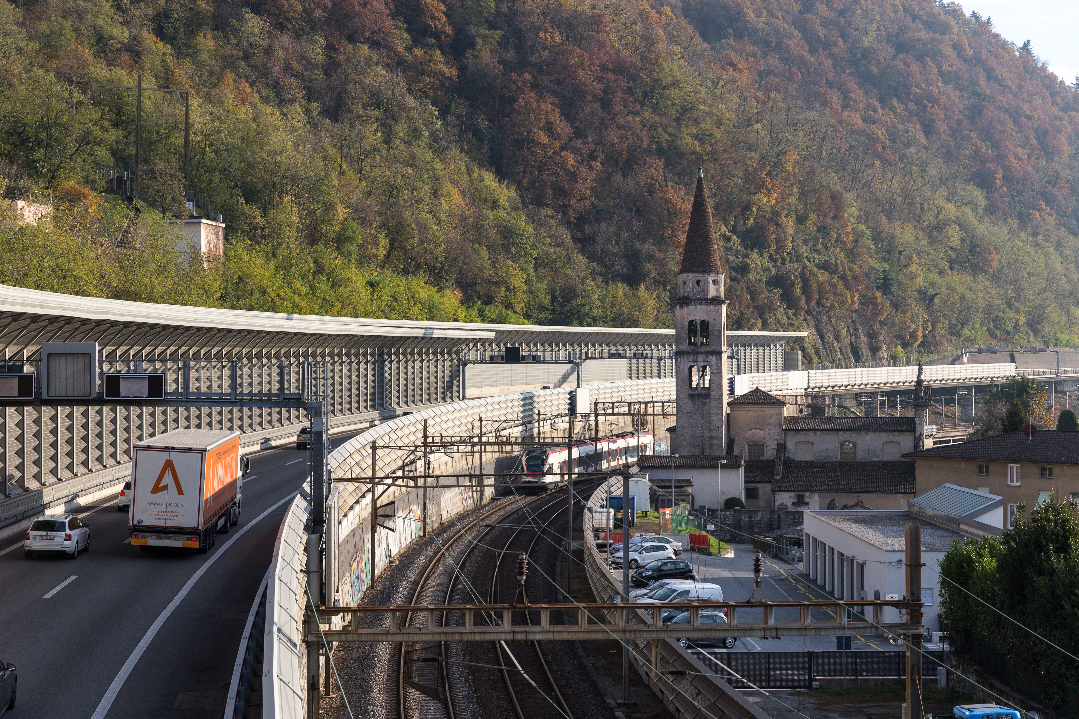 Bissone am Lago di Lugano ist von Verkehrswegen umschlossen. Zur Autobahn und Bahnlinie kommt noch die Kantonsstrasse am See hinzu.